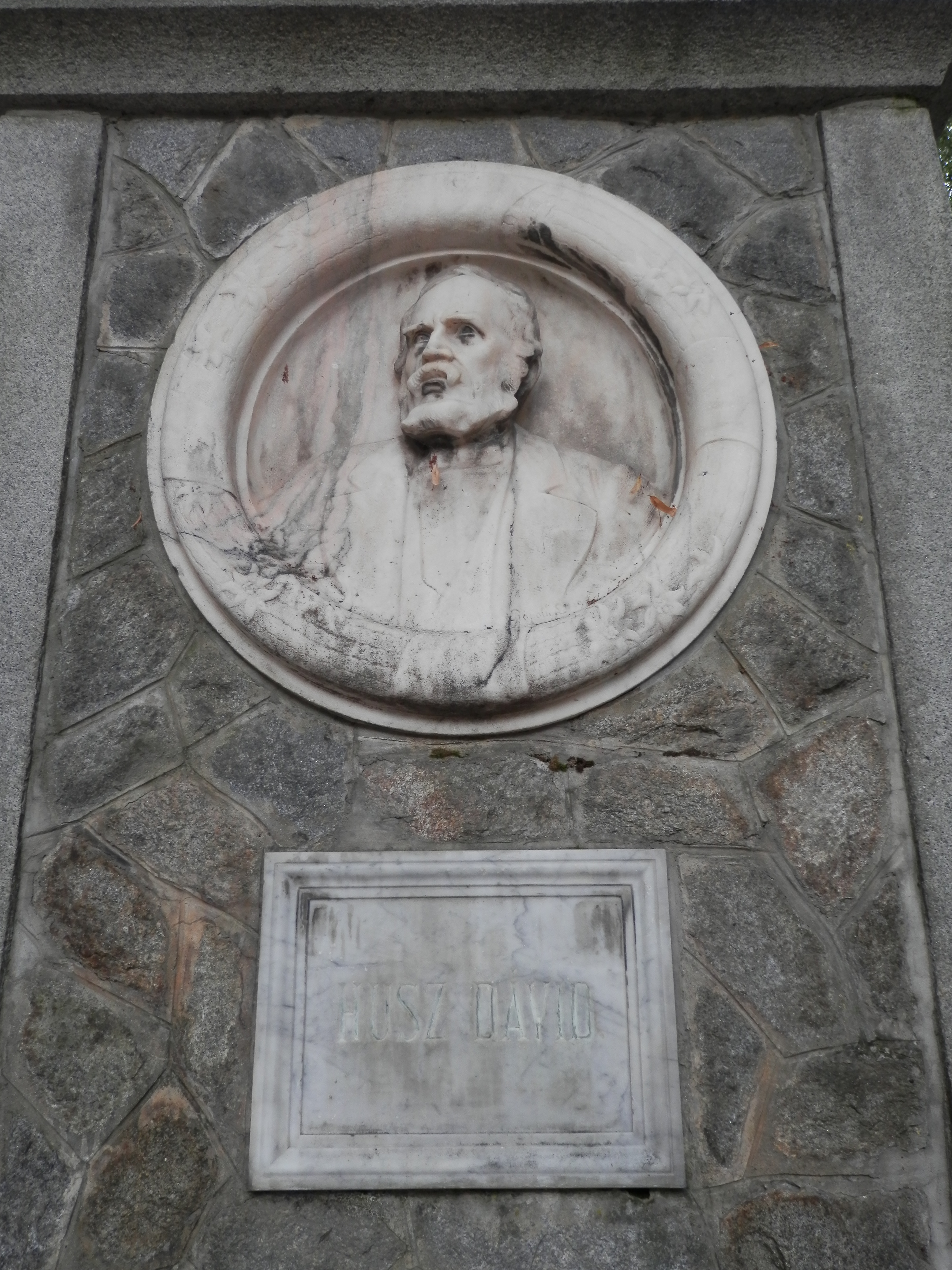 Pamätná tabuľa, bola odhlálená v roku 1913; Husz David, Podtatranské múzeum v meste Poprad.